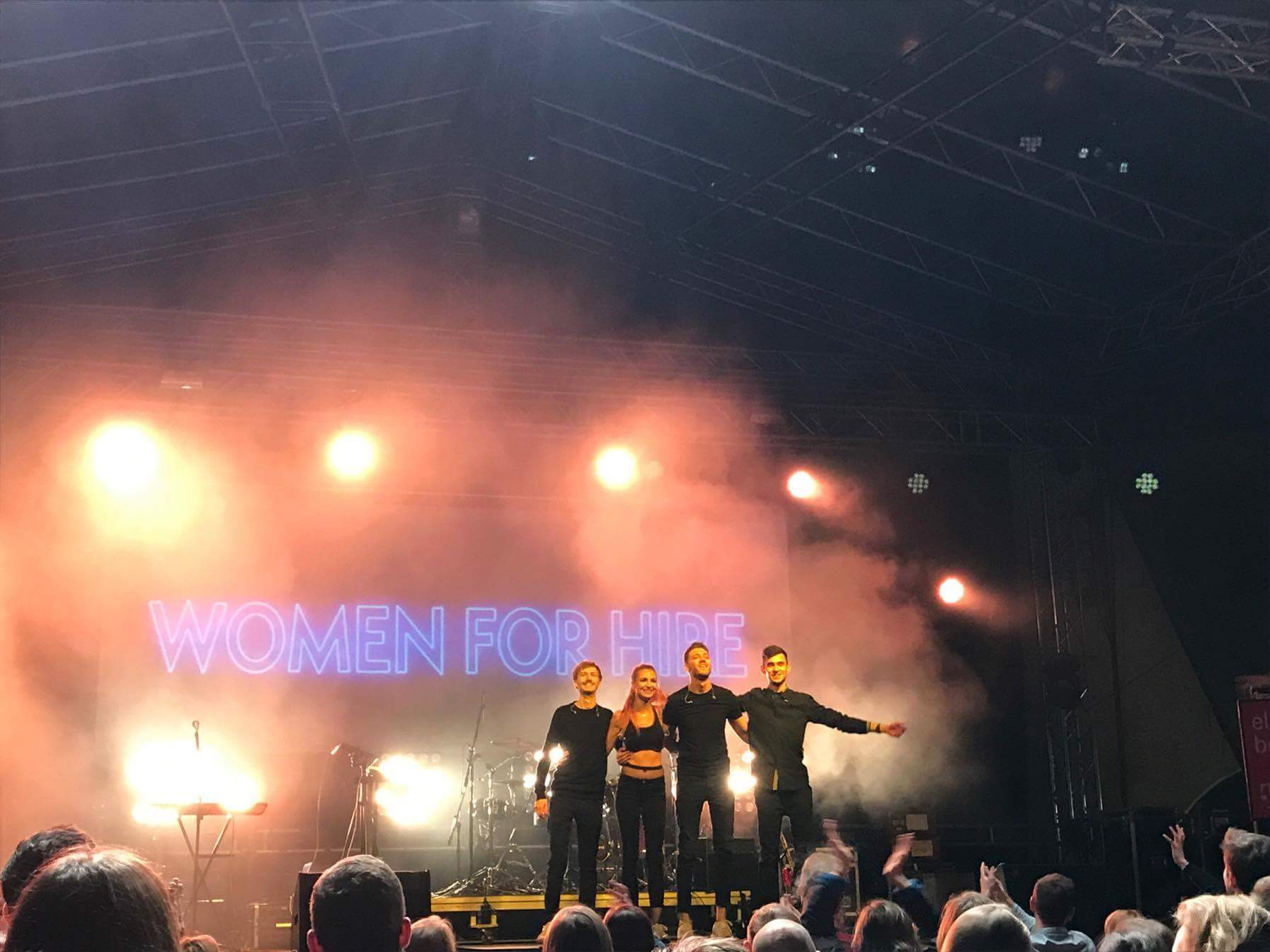 Women For Hire podczas koncertu 17. MFF Nowe Horyzonty 2017, Electronic Beats Stage